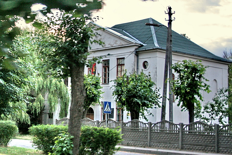 Giedraičių Antano Jaroševičiaus vidurinė mokykla